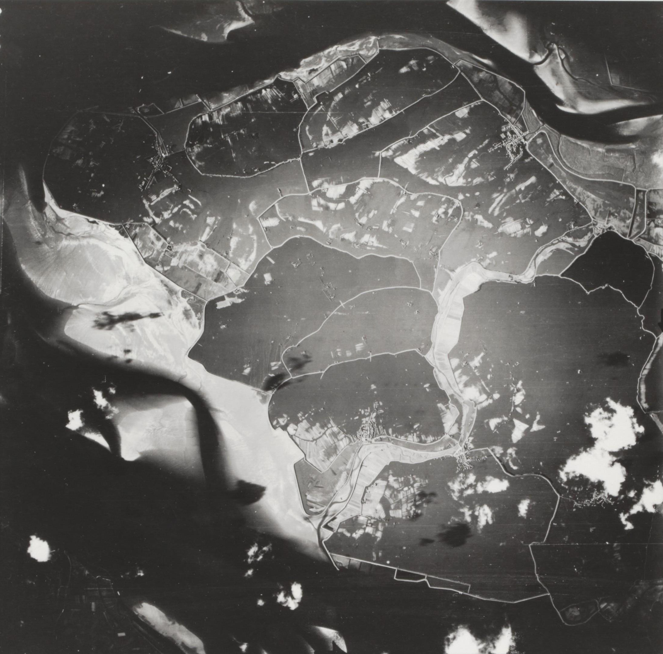 Luchtopname. Het eiland Tholen onder water